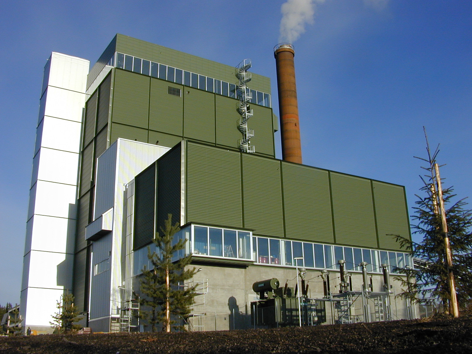 Jämtkrafts kraftvärmeverk Lugnviksverket